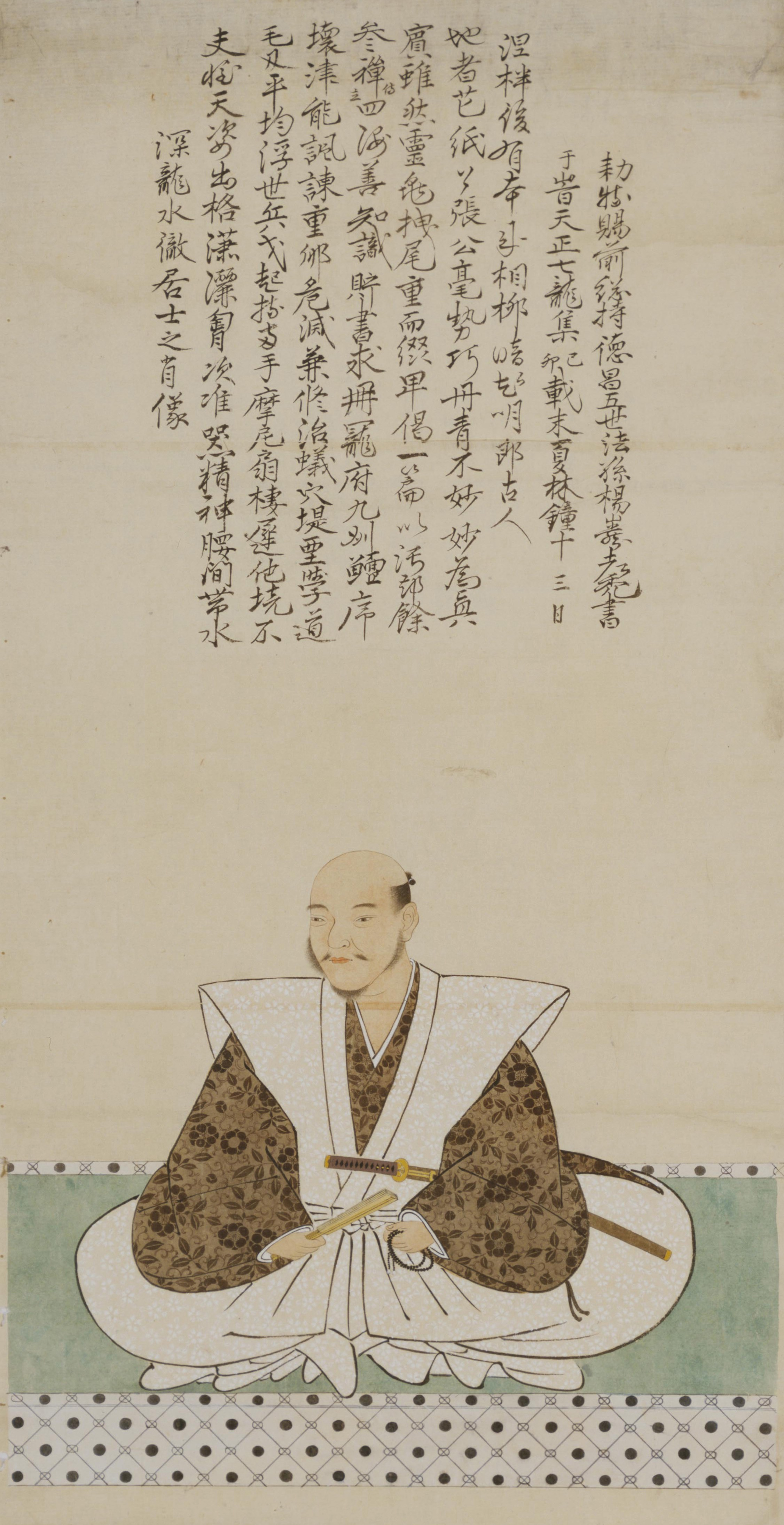 竹中重治の銅像(岐阜県垂井町岩手、竹中氏陣屋跡) 撮影：投稿者(Monami)、撮影日：2005年9月